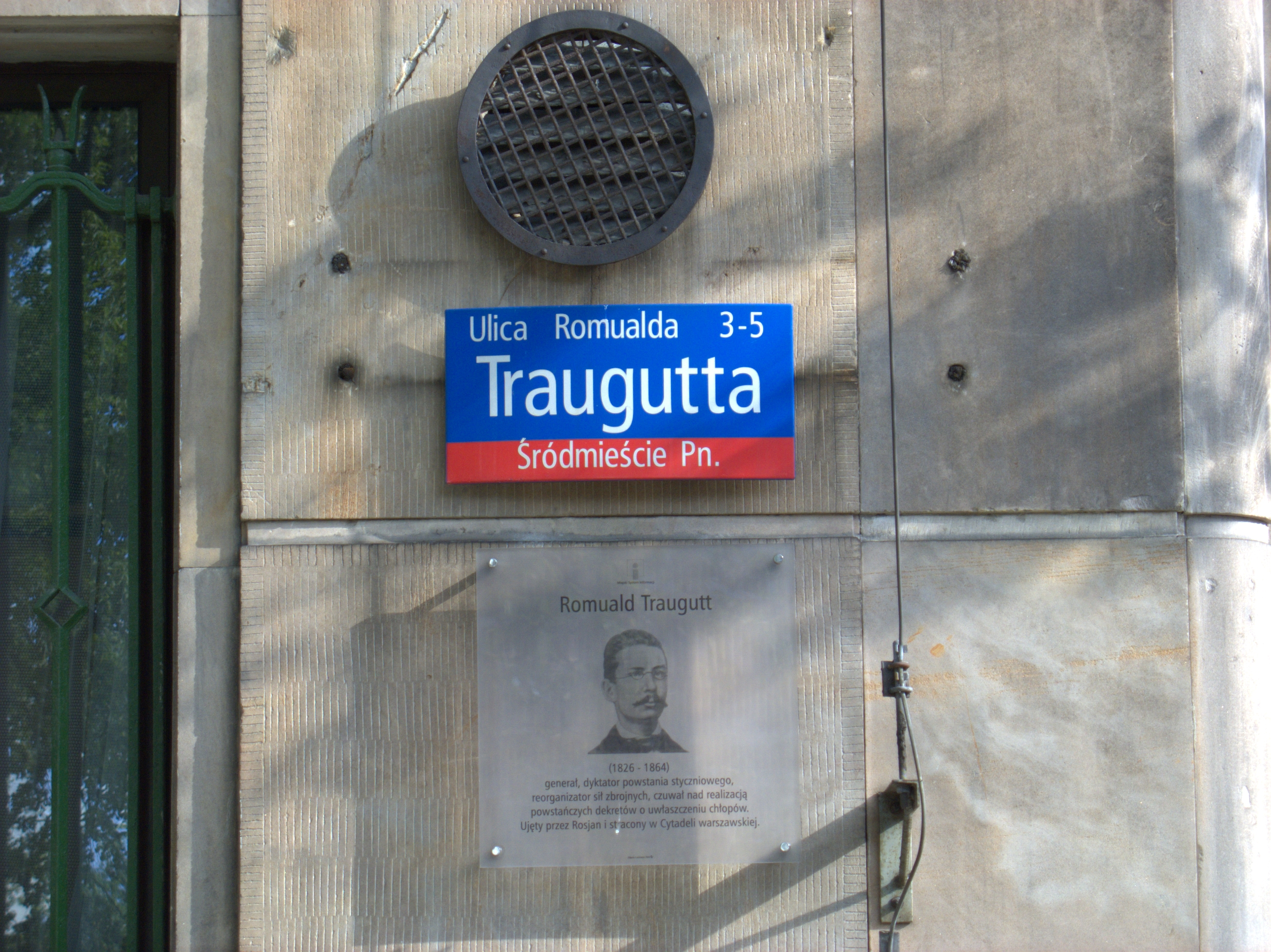 Ulice Romualda Traugutta ve Varšavě. Na zdi domu je označení ulice, dole pamětní skleněná deska s Romualdem Trauguttem